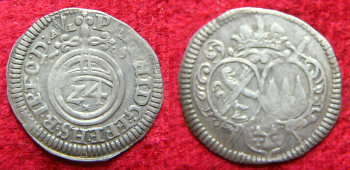 Groschen von 1683 aus der Zeit des Würzburger und Bamberger Bischofs Peter Philipp von Dernbach